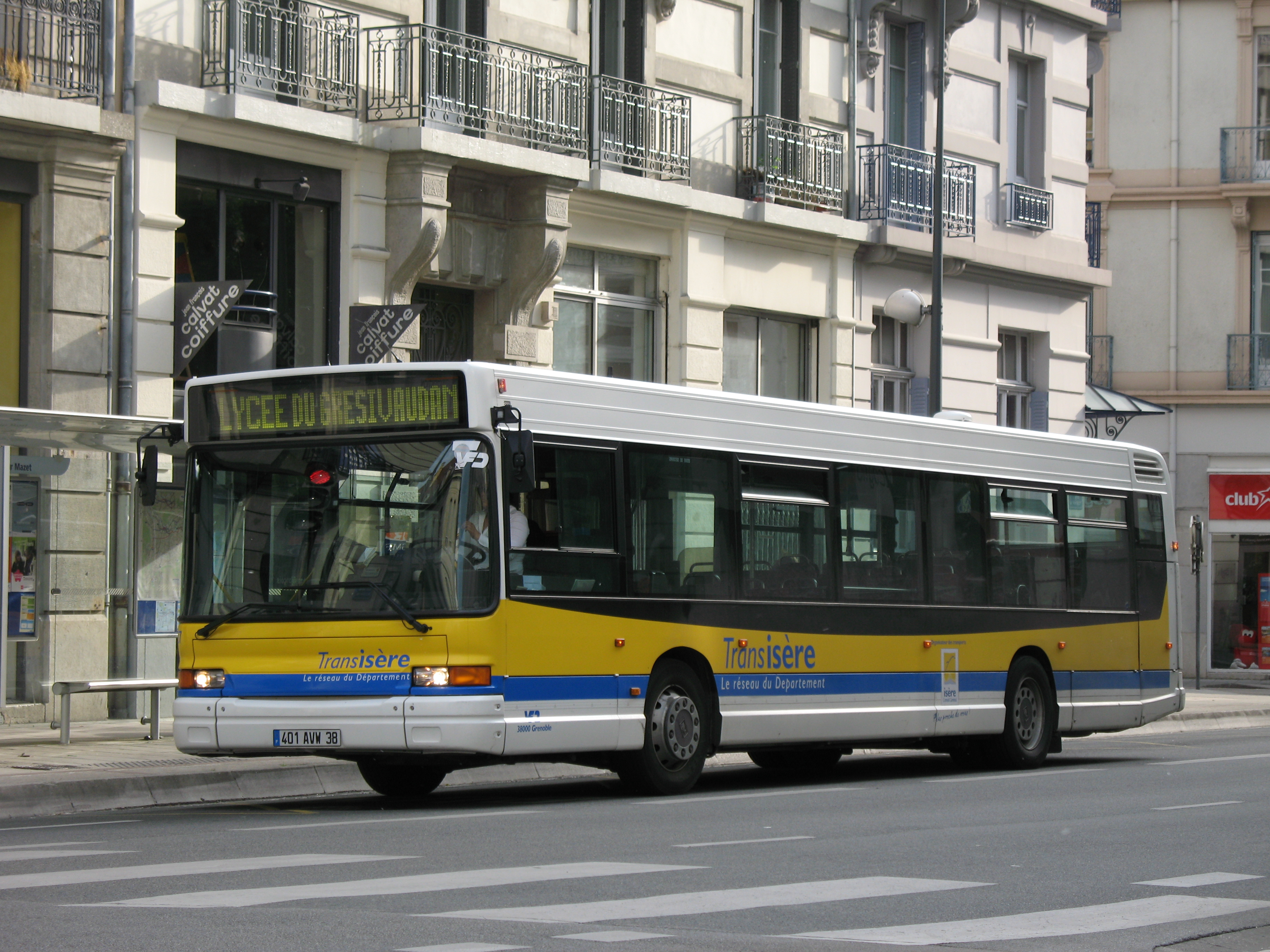 Un bus Heuliez GX 217 Volvo sur la ligne n°6020 du réseau Transisère.